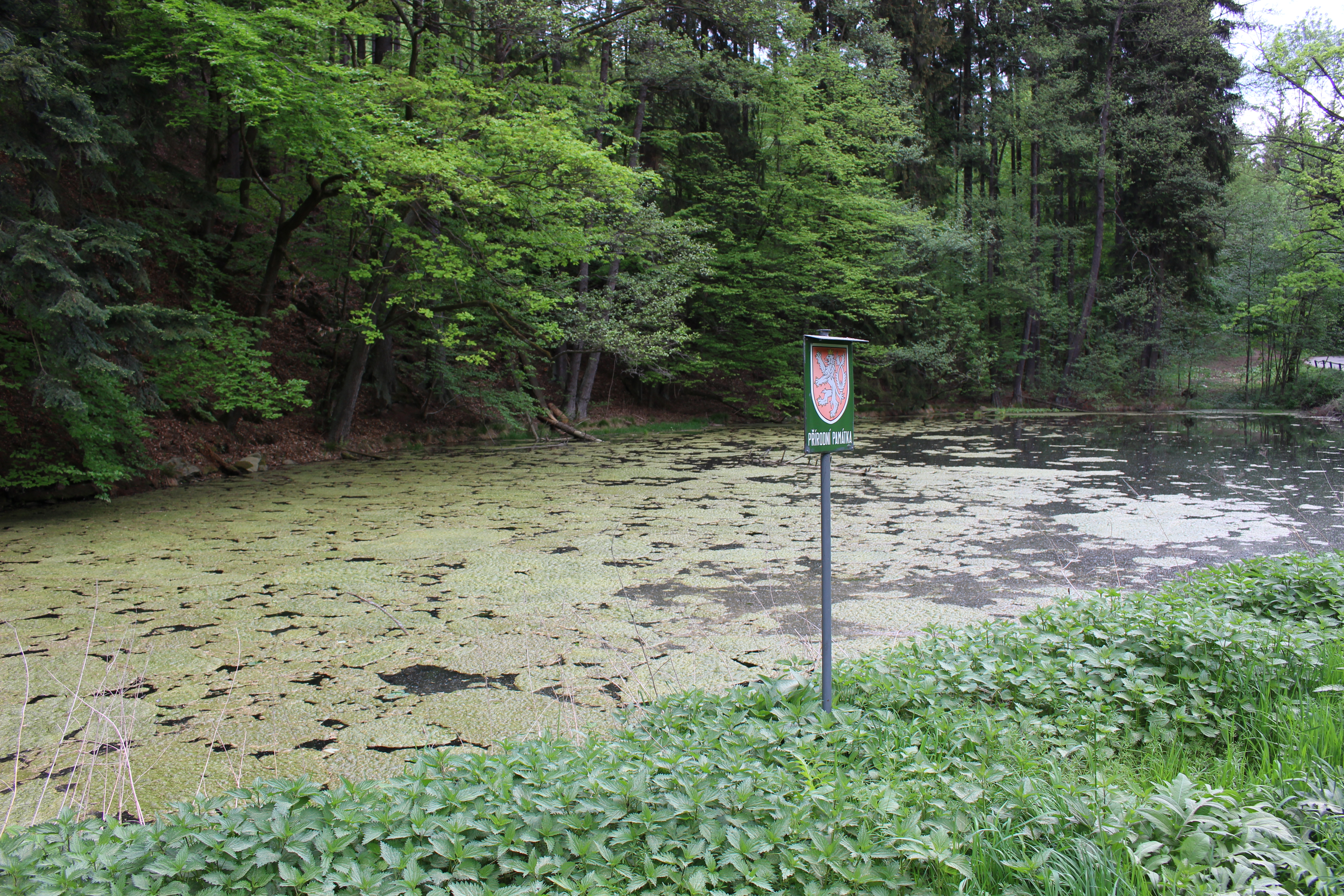 Přírodní památka Pilský rybníček, k.ú. Synalov, okres Brno-venkov, Jihomoravský kraj